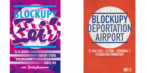 Plakate für Blockupy 2013